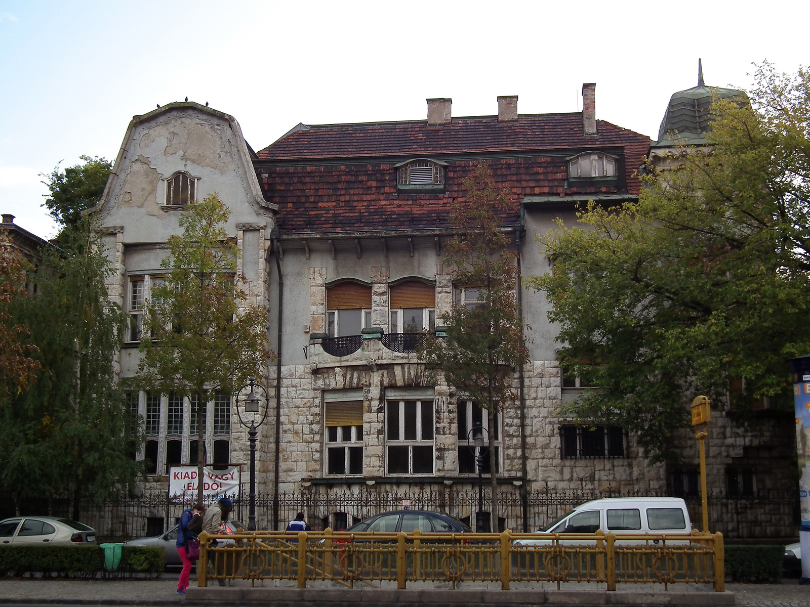 Schanzer-villa (Budapest 6, Andrássy út 101.)